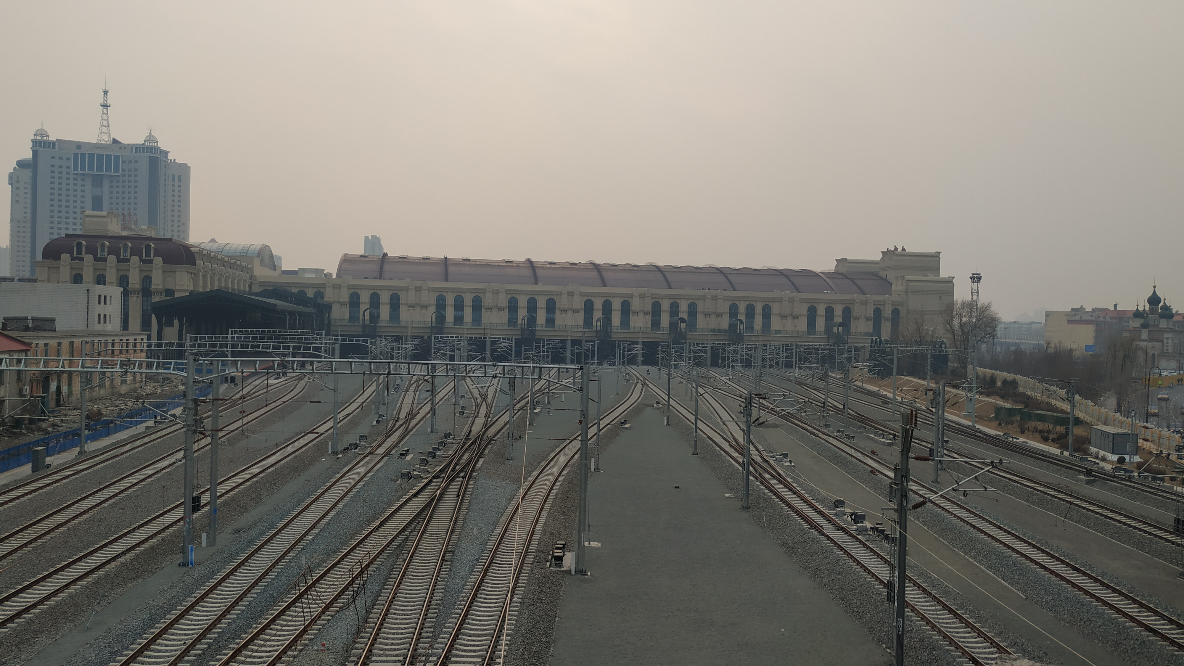 中文（中国大陆）: 从霁虹桥西南方向望向哈尔滨站